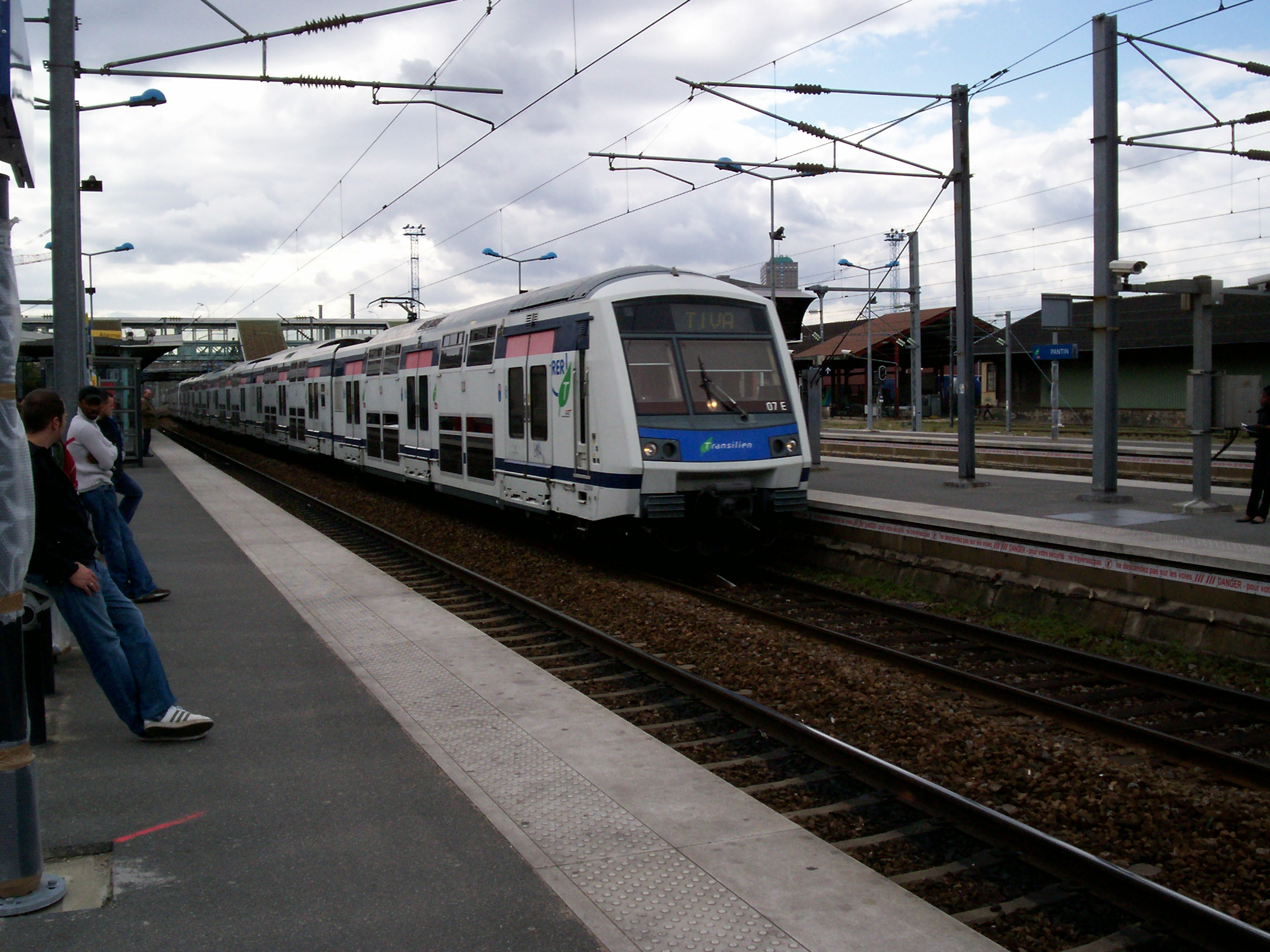 Train TIVA passant sans s'arrêter à Pantin